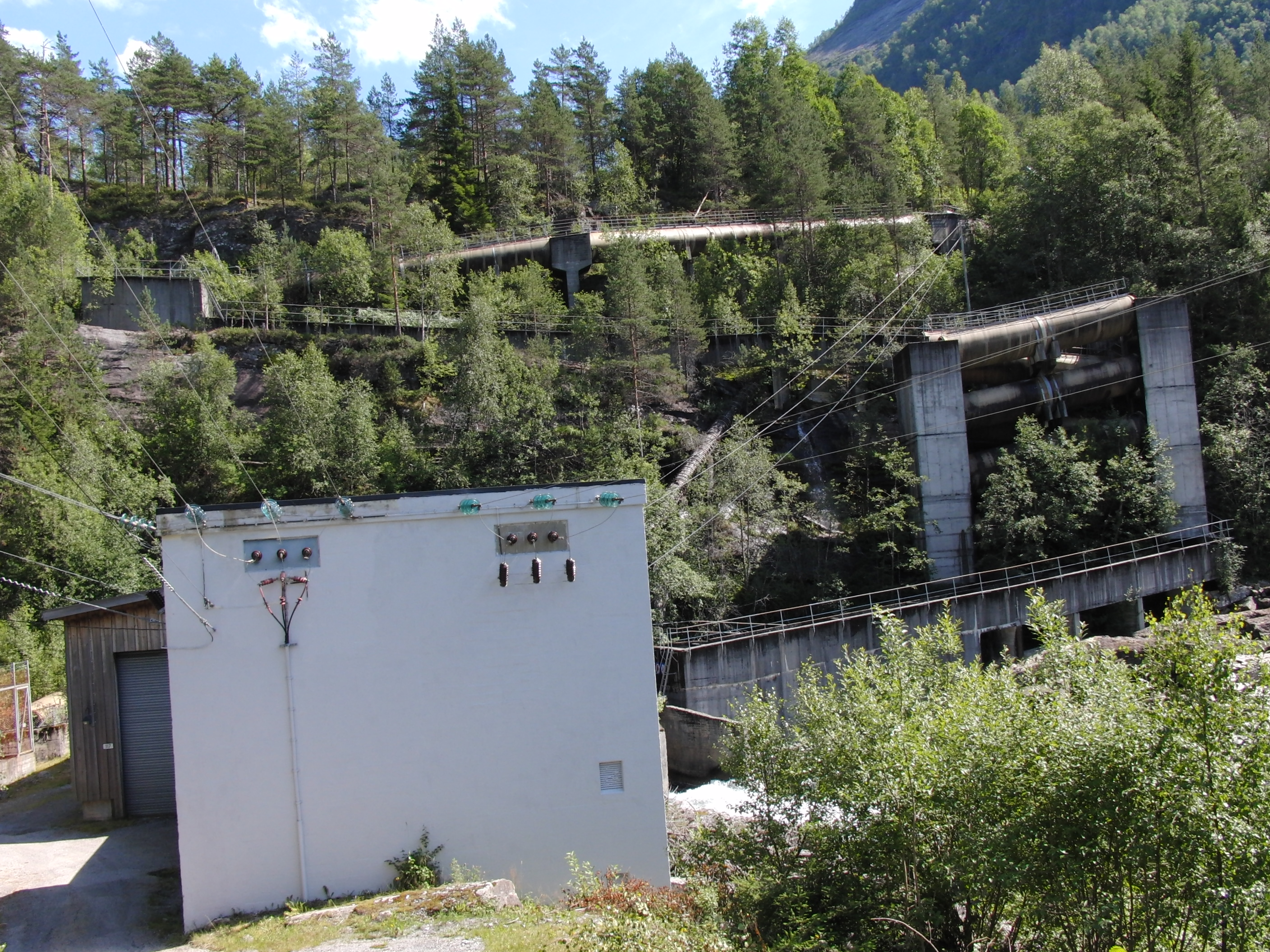 Hellandsfossen kraftverk, laksetrapp